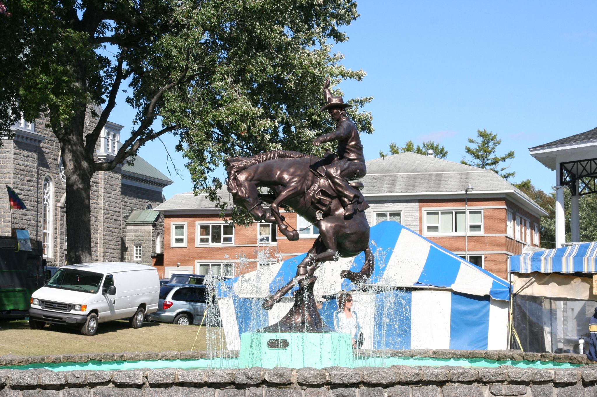 FestivalWST